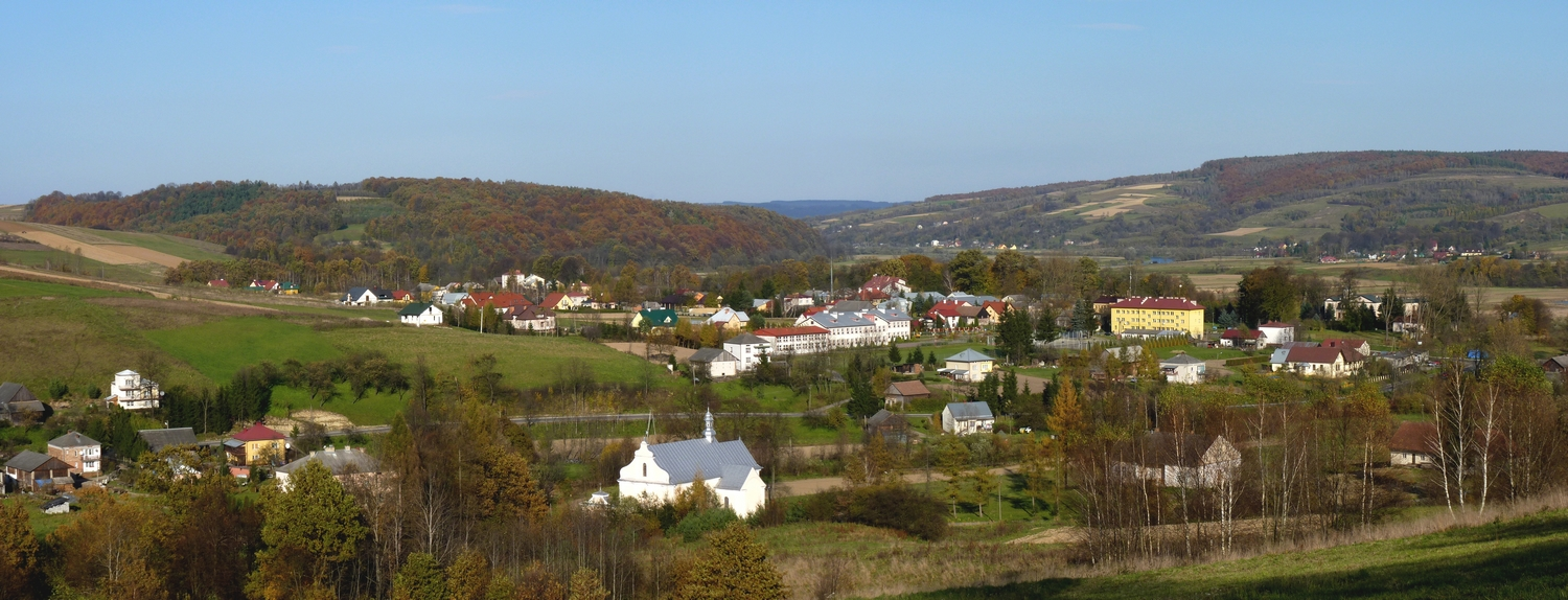 Panorama Nozdrzca